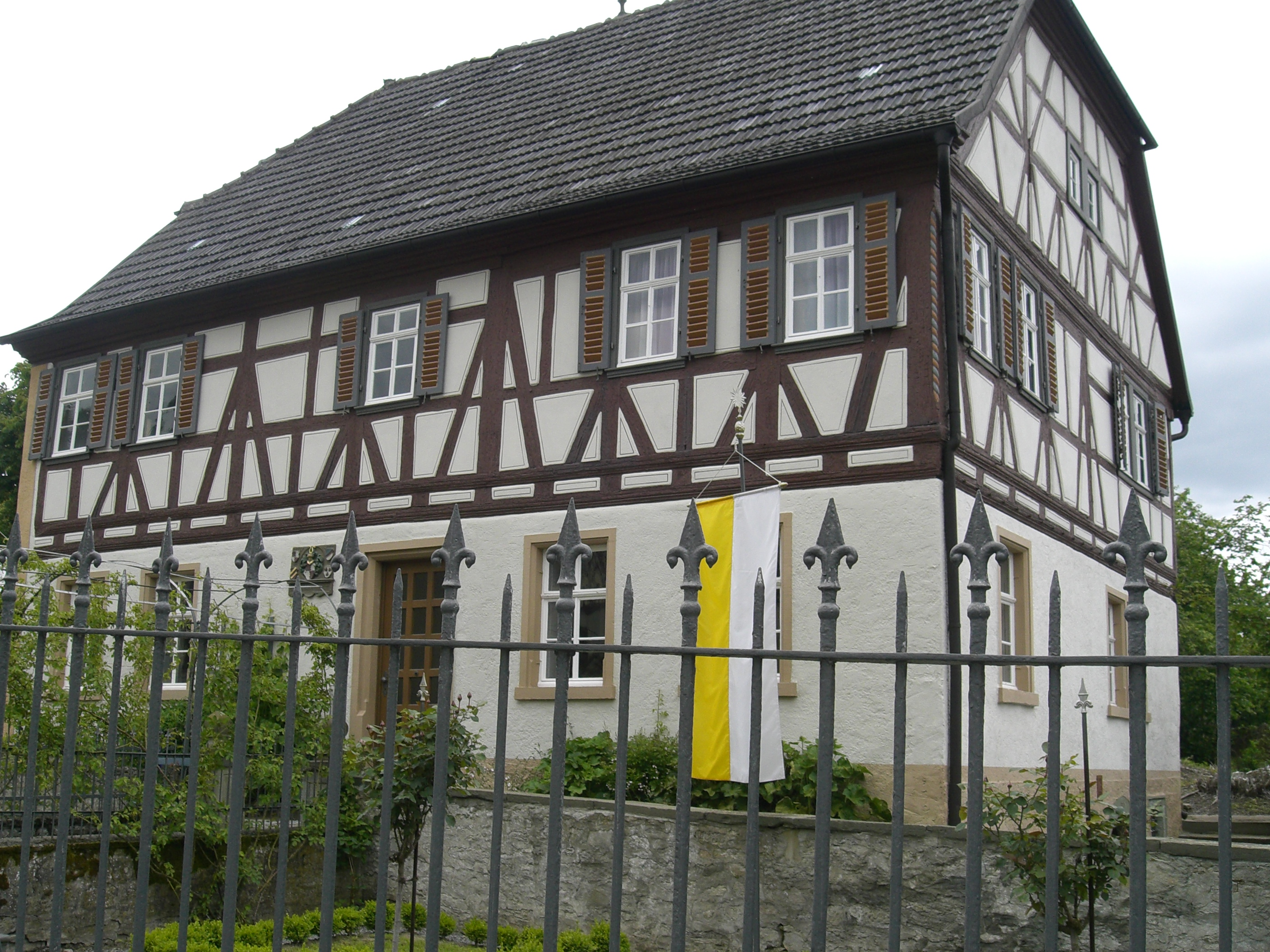 Pfarrhaus in Greßthal